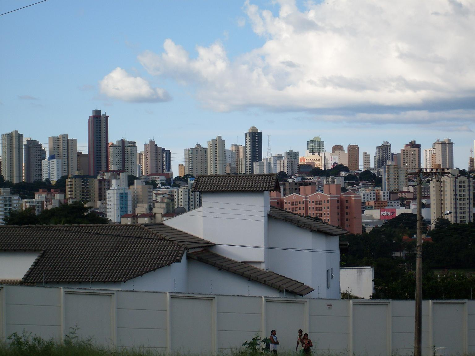 Skyline, Uberlândia, Minas Gerais, Brazil